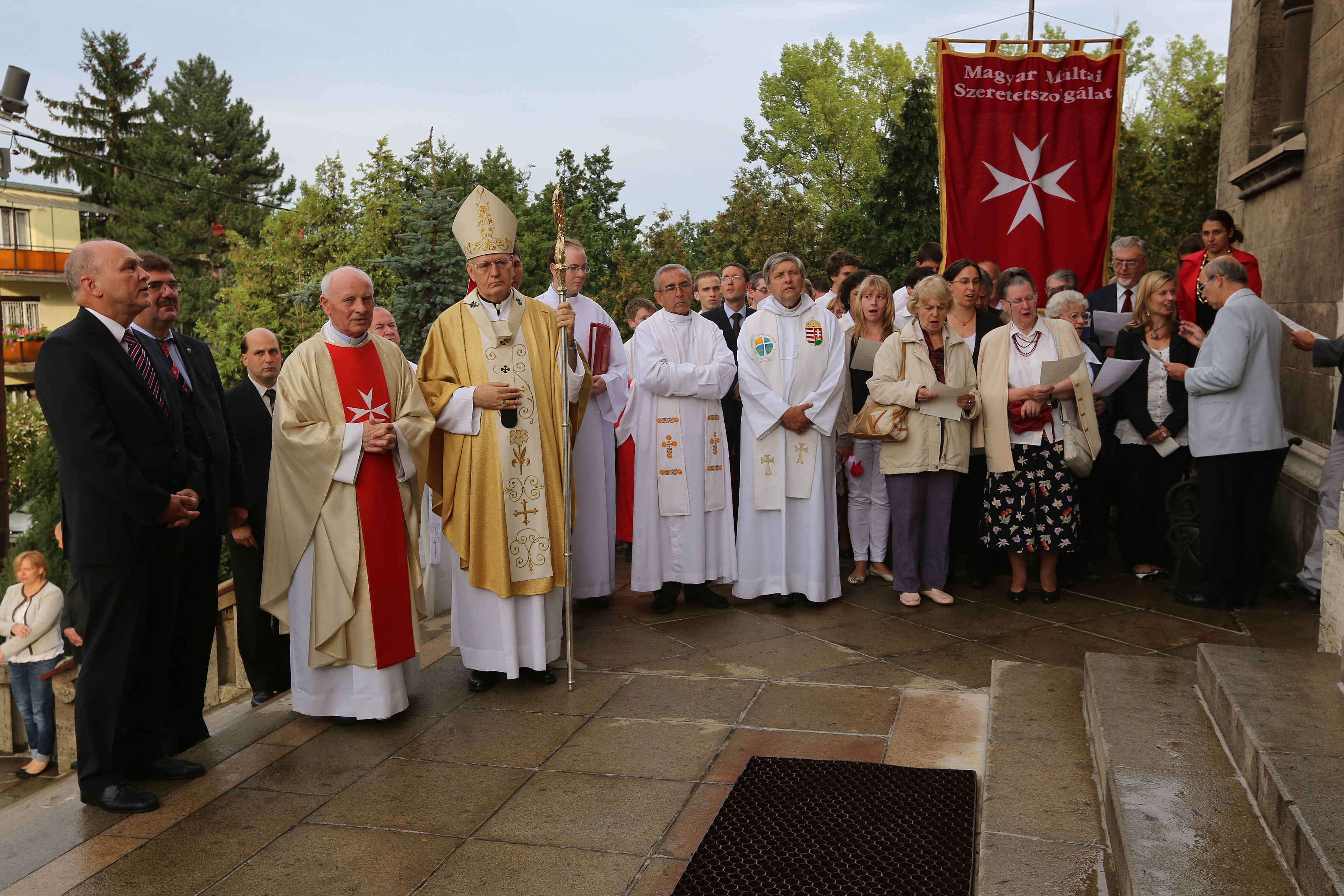 Emléktábla koszorúzása a zugligeti Szent Család templombejáratánál, a keletnémet menekültek megsegítésének 25 éves emlékmiséje után. Német Bp-i követ, Győri-Dani Lajos MMSZ alelnök, Kozma Imre atya és Erdő Péter bíboros.